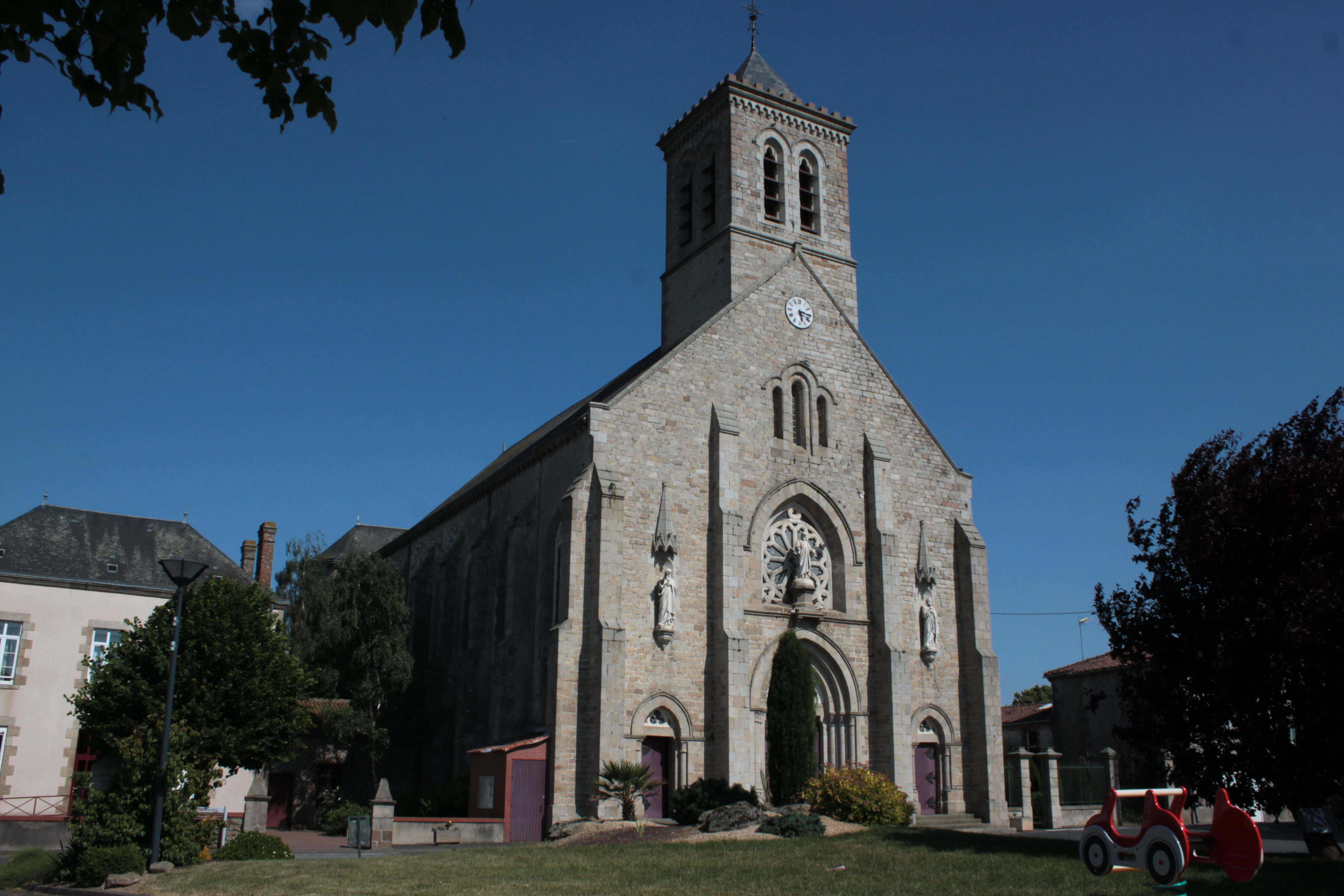 Église Saint-Pierre, 1863, Fr-49-Roussay.